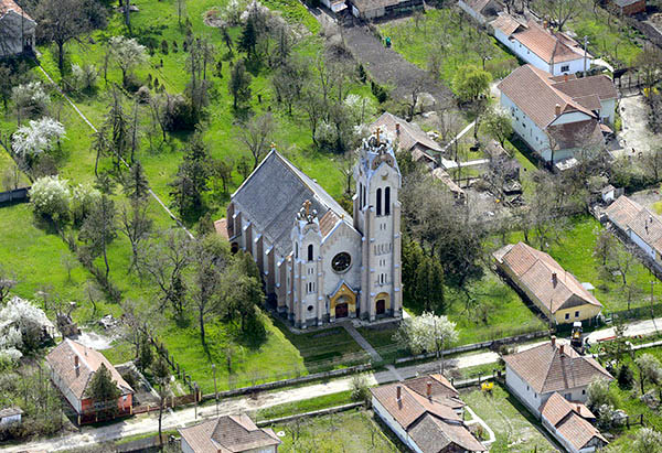 Légifotó Bucsáról